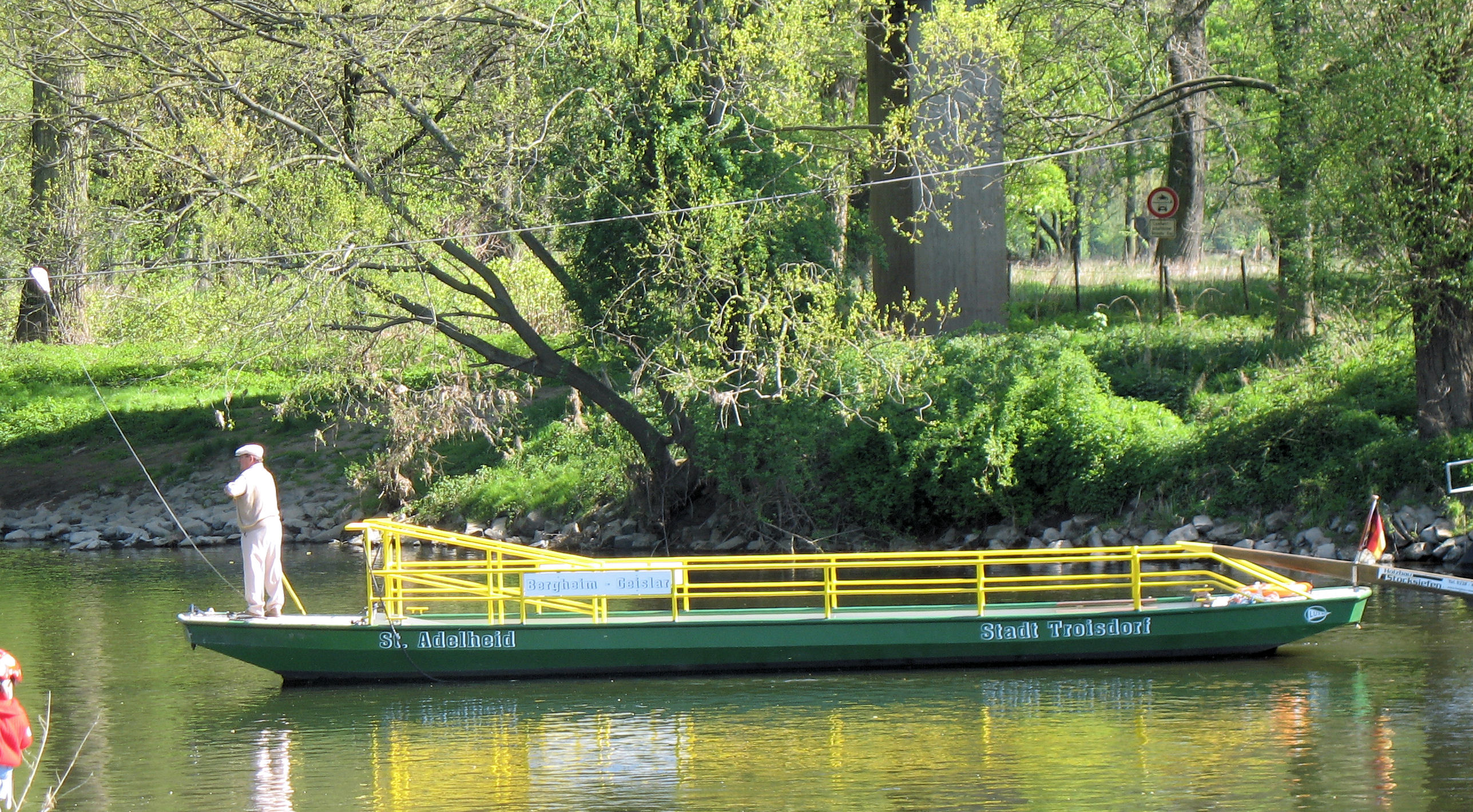 Siegfähre zwischen Bergheim und Geislar